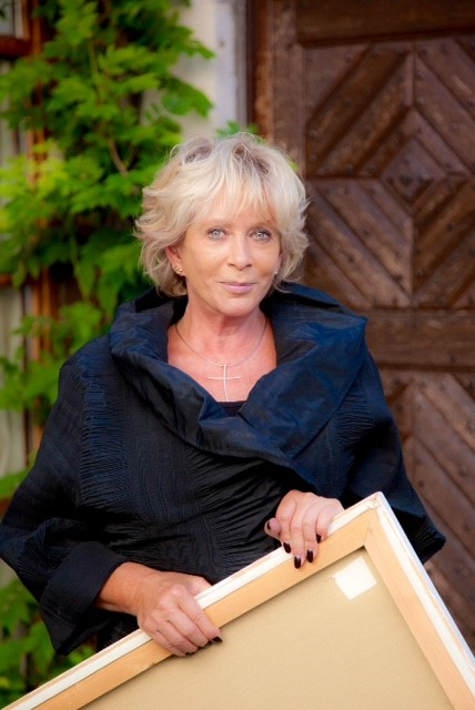 Foto von Angelika Kühnen